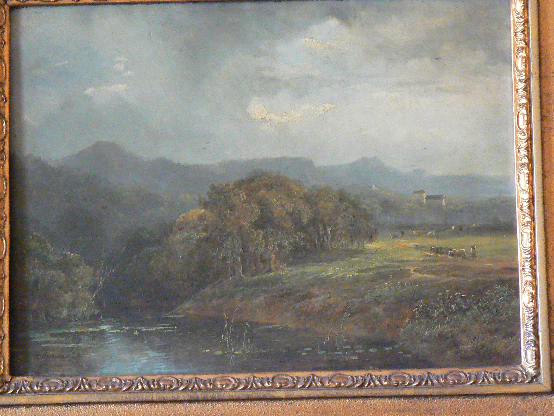 Paysage champêtre, huile sur bois, 32 cm x 24 cm